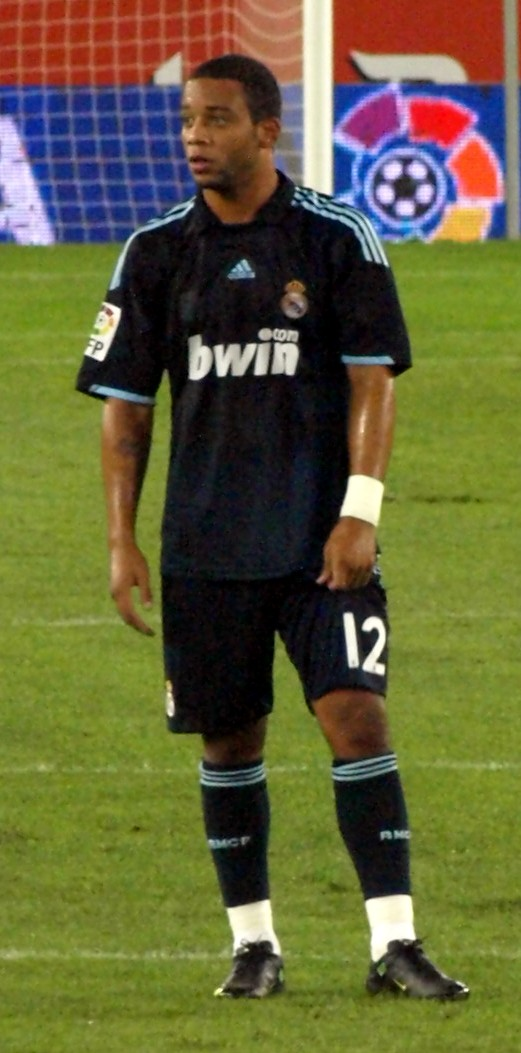 Marcelo en el partido que enfrentó al Real Madrid con el RCD Español en el Estadio de Cornellá-El Prat de la primera vuelta de La Liga 2009/10.